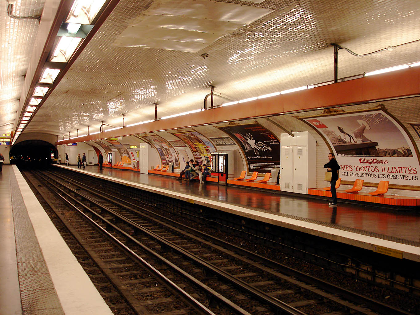 Station Richelieu - Drouot de la ligne 9 du métro de Paris, France.